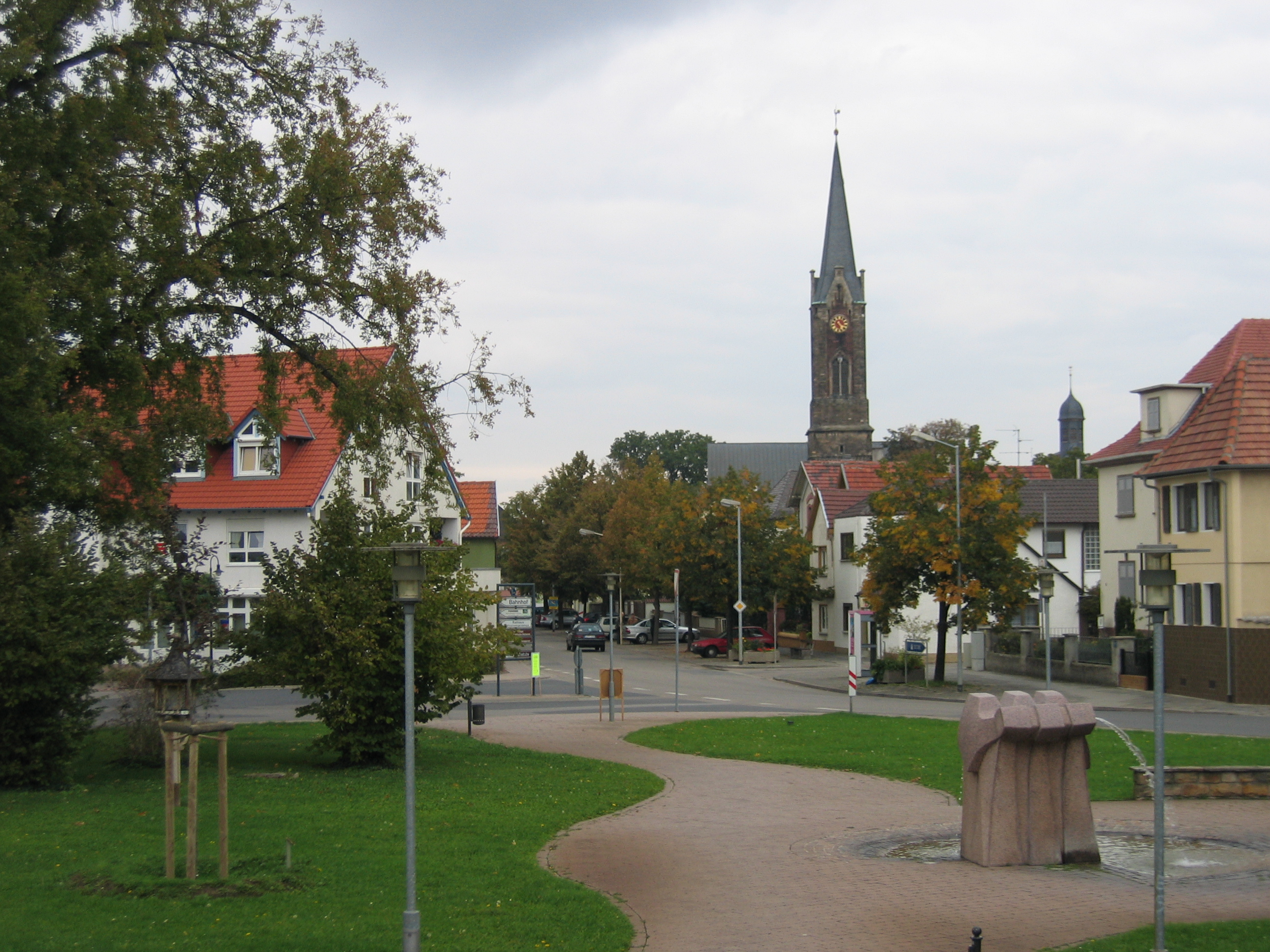 Motiv: Ortsmitte Lambsheim Fotograf: Romantiker Aufnahmedatum: 26.09.2004 Bildname: Lambsheim Orstmitte.jpg Bildgröße: 2 592 Pixel x 1 944 Pixel (2 230 292 Bytes) Lizenz: GNU Freie Dokumentationslizenz